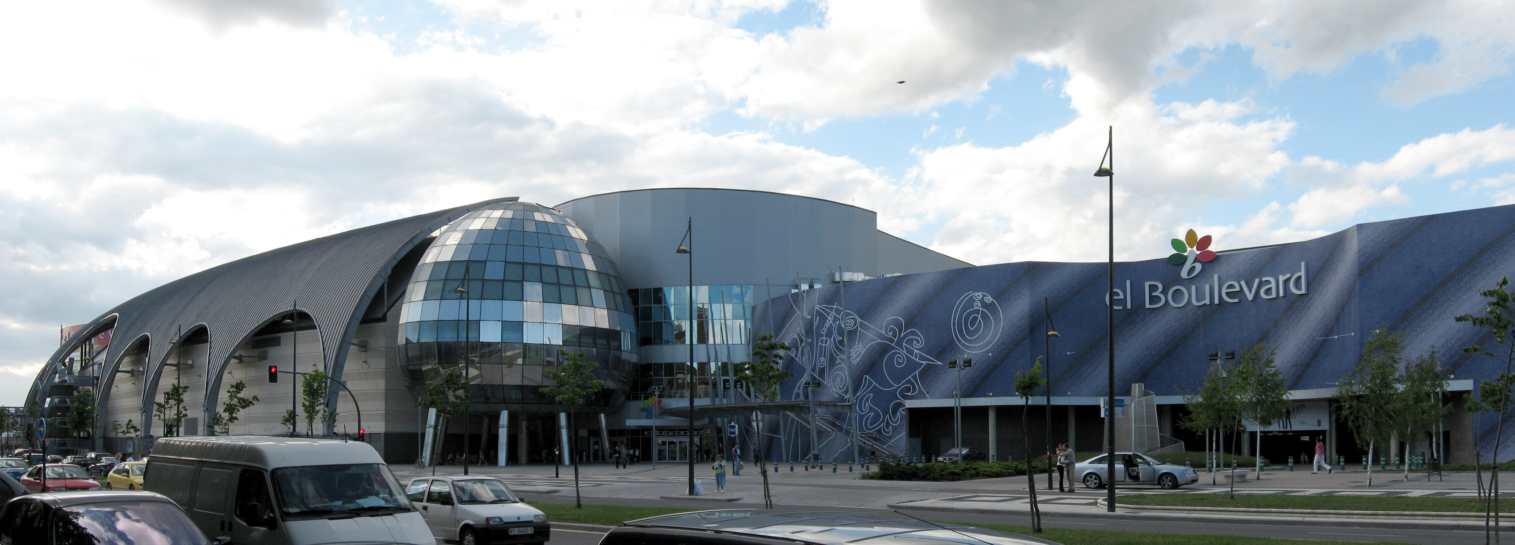 Desc: Centro comercial "El Boulevard" en Vitoria-Gasteiz.